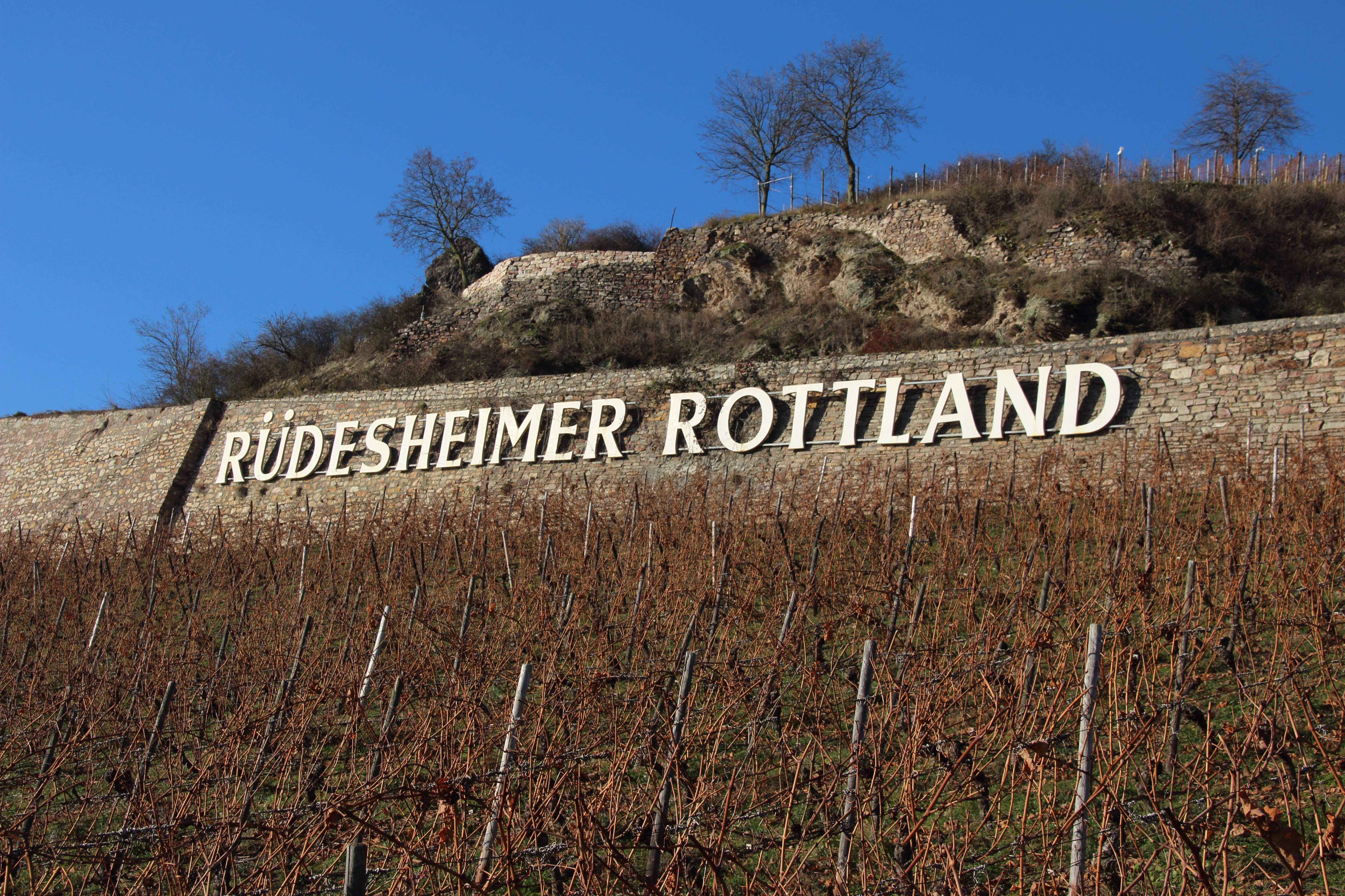 "Rüdesheimer Rottland", Weinbergslage am Rüdesheimer Berg. Rüdesheim am Rhein.